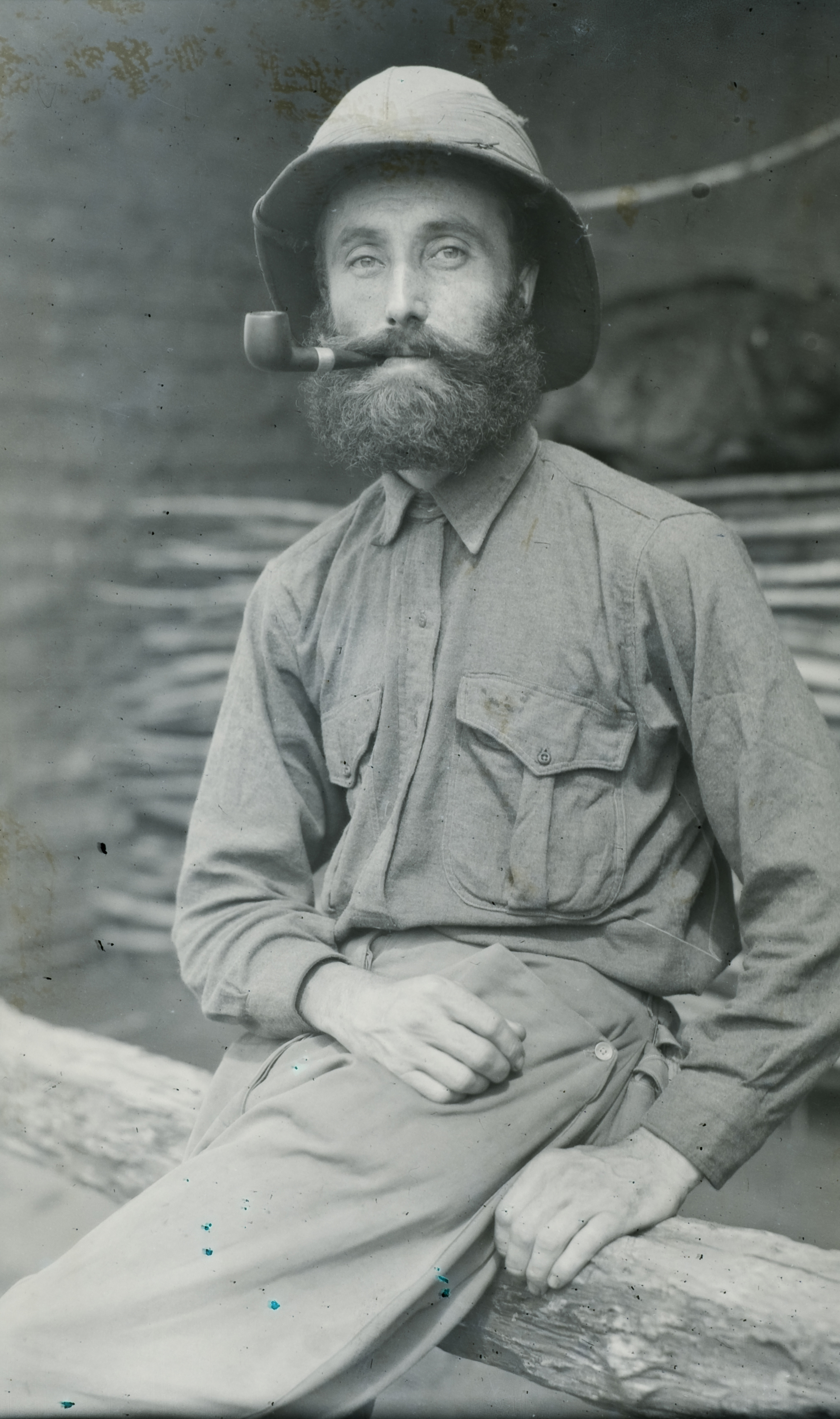 Portrait du marquis de Wavrin pendant une de ses expéditions